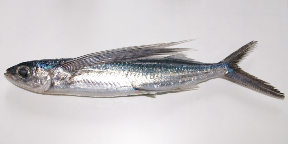 Cheilopogon pinnatibarbatus japonicus (Franz, 1910)